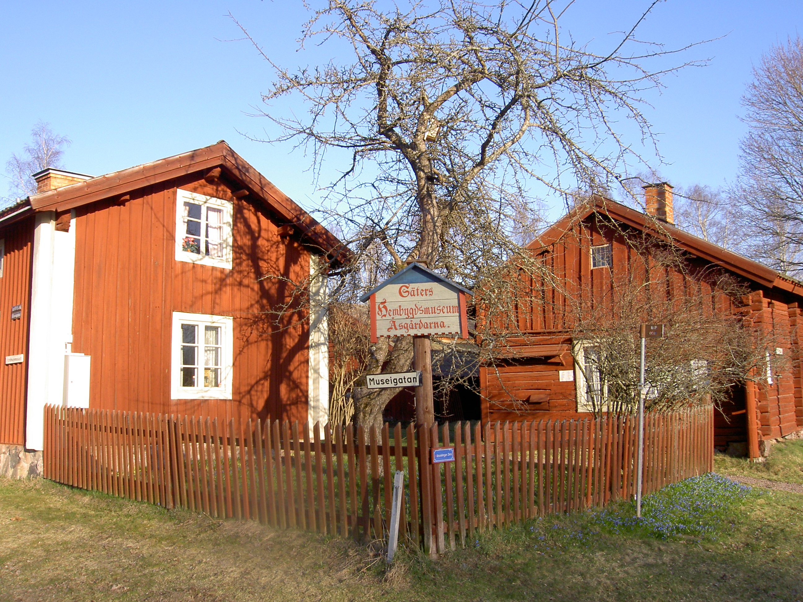 Säters hembygdsmuseum Åsgårdarna